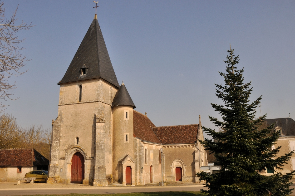 Saint-Hilaire-sur-Benaize (Indre) - Eglise